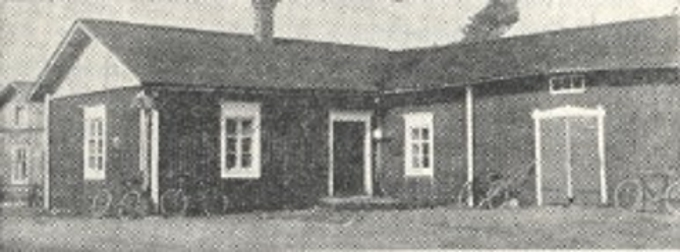 Ilmajoen Nopankylän osuuskaupan ensimmäinen toimitalo.